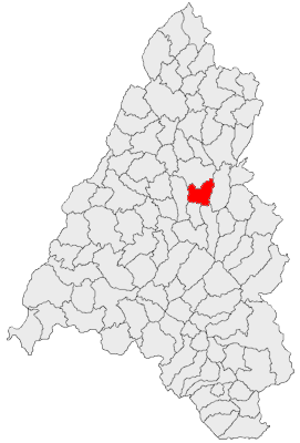 Categorie:Hărţi ale judeţului Bihor